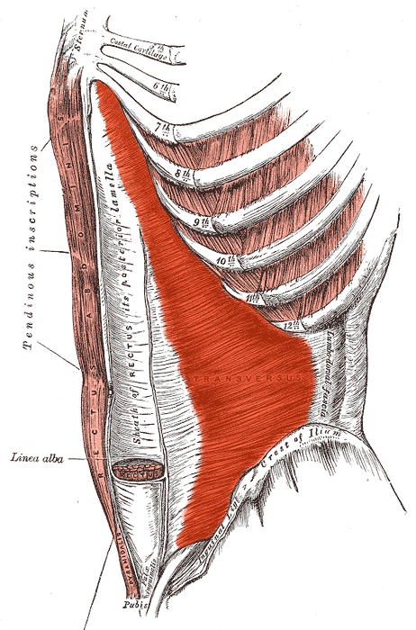 Transversus abdominis muscule